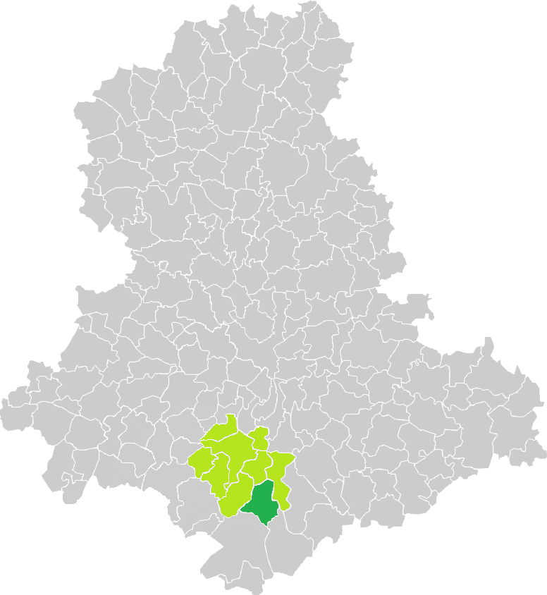 Carte de situation de la commune de La Roche-l'Abeille (en vert foncé) dans le votre Canton (en vert clair) sur une carte des communes de la Haute-Vienne